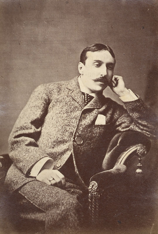 O escritor Eça de Queirós em 1882.